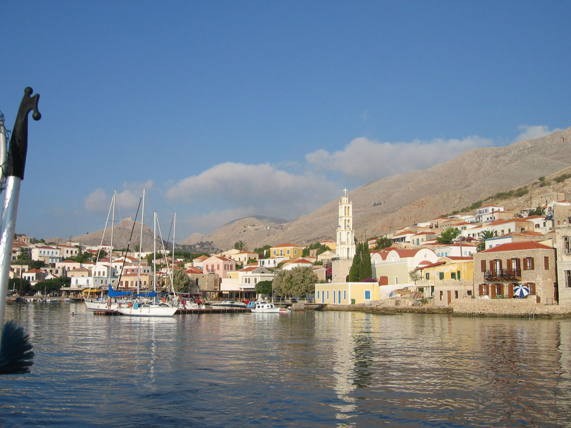 Ansicht der Insel Chalki